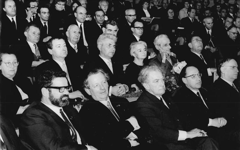 Zentralbild Franke 26.3.1970 Berlin: Außerordentliche öffentliche Plenartagung der Akademie der Künste. Die Deutsche Akadmie der Künste zu Berlin beging am 25.3.70, mit einer außerordentlichen öffentlichen Plenartagung, den 20. Jahrestag ihrer Gründung. An dieser festlichen Veranstaltung im Haus der Akademie, nahmen u.a. teil: der Präsident der Akademie, Konrad Wolf, der amtierende Präsident, Prof. Klaus Wittkugel, das Mitglied des Staatsrates Prof. Hans Rodenberg, der Minister der SED, Prof. Kurt Hager (erste Reihe, v.l.n.r.), sowie Prof. Gerhard Kettner, Käte-Kollwitz-Preisträger 1970, Martin Viertel, Jeanne Stern, Kurt Stern und Fritz Selbmann, Heinrich-Mann-Preisträger 1970, (zweite Reihe v.l.n.r.). Die Preise wurden während der Plenartagung verliehen.